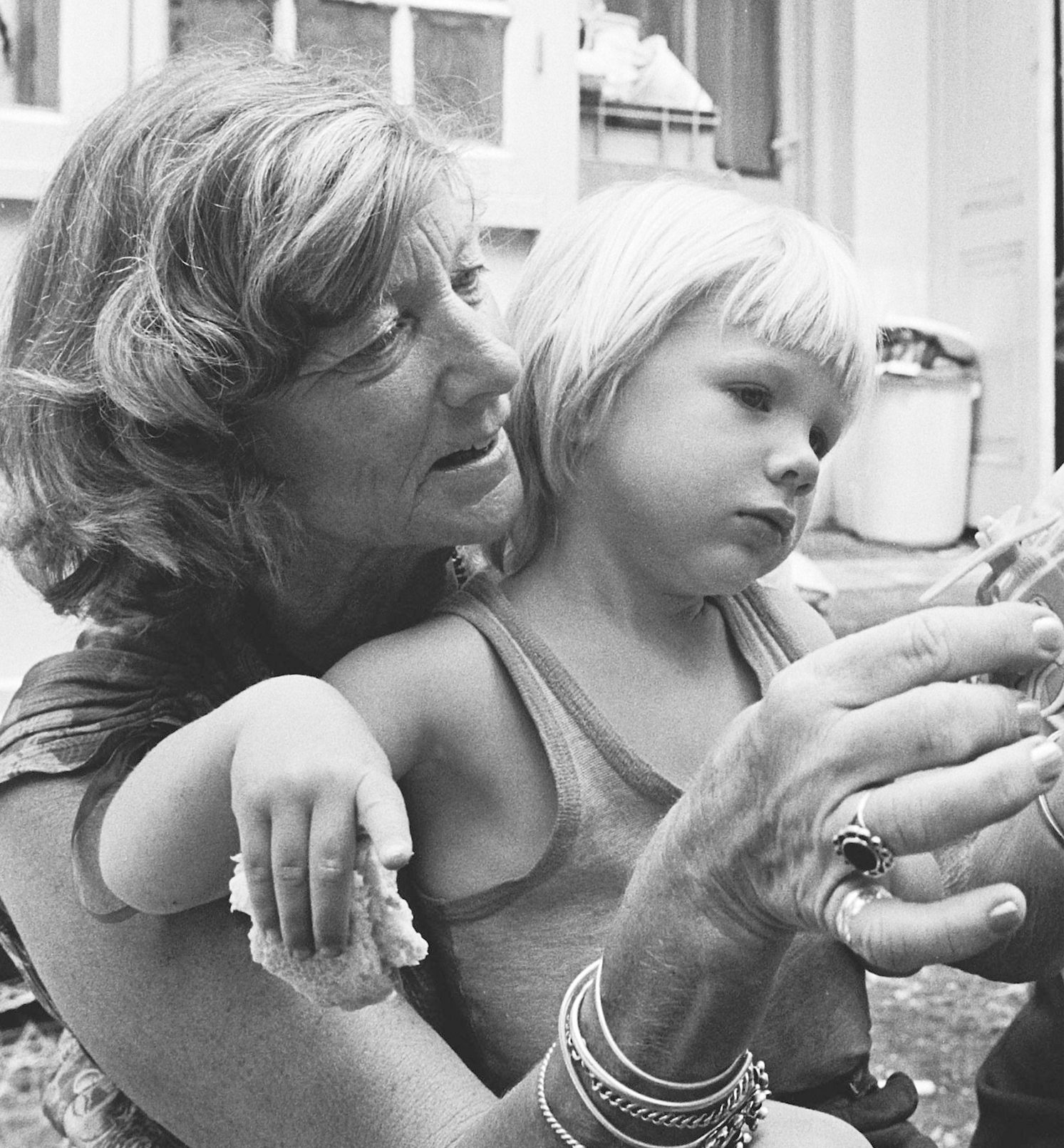 Presentatrice Lily Petersen van het radioprogramma "Kleutertje luister" neemt afscheid van haar kleuterklasje 6 juli 1979